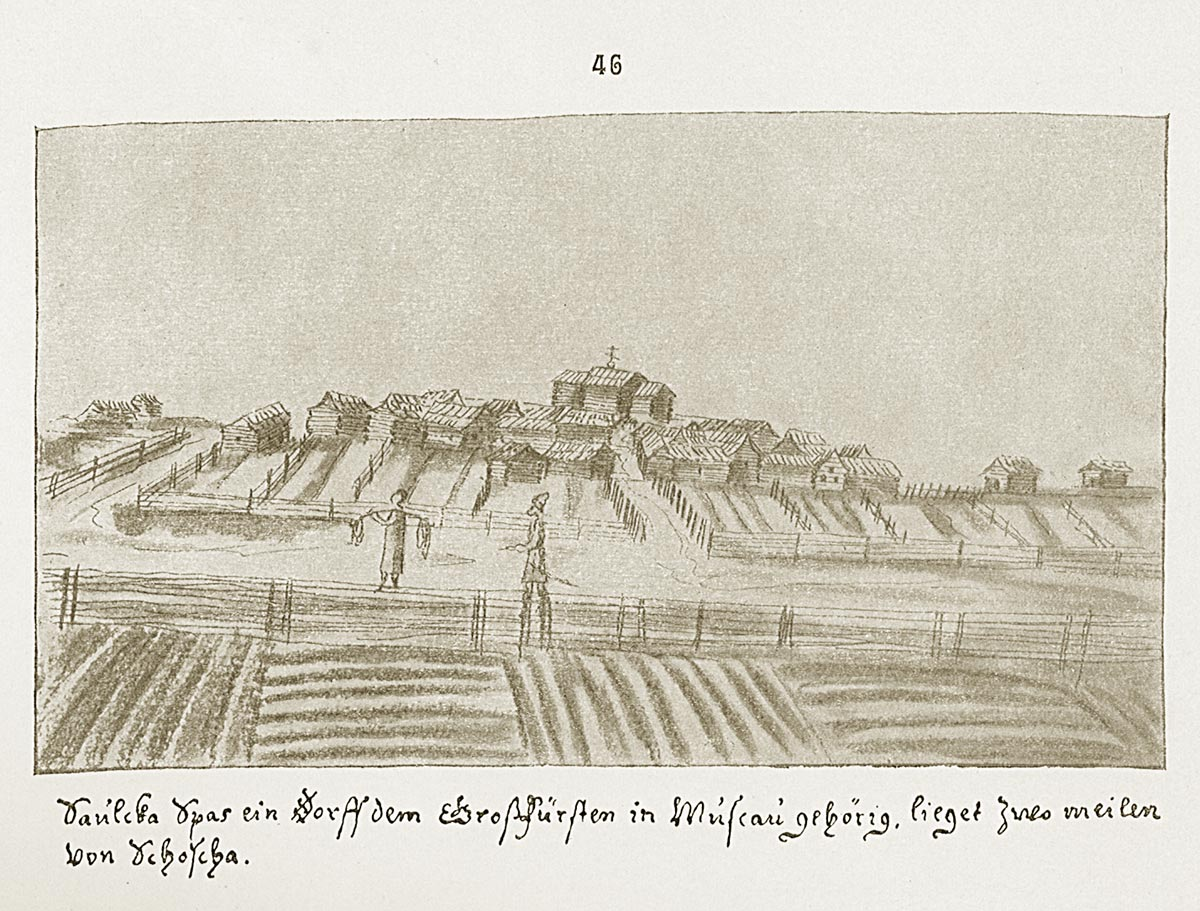 Спас-Заулки